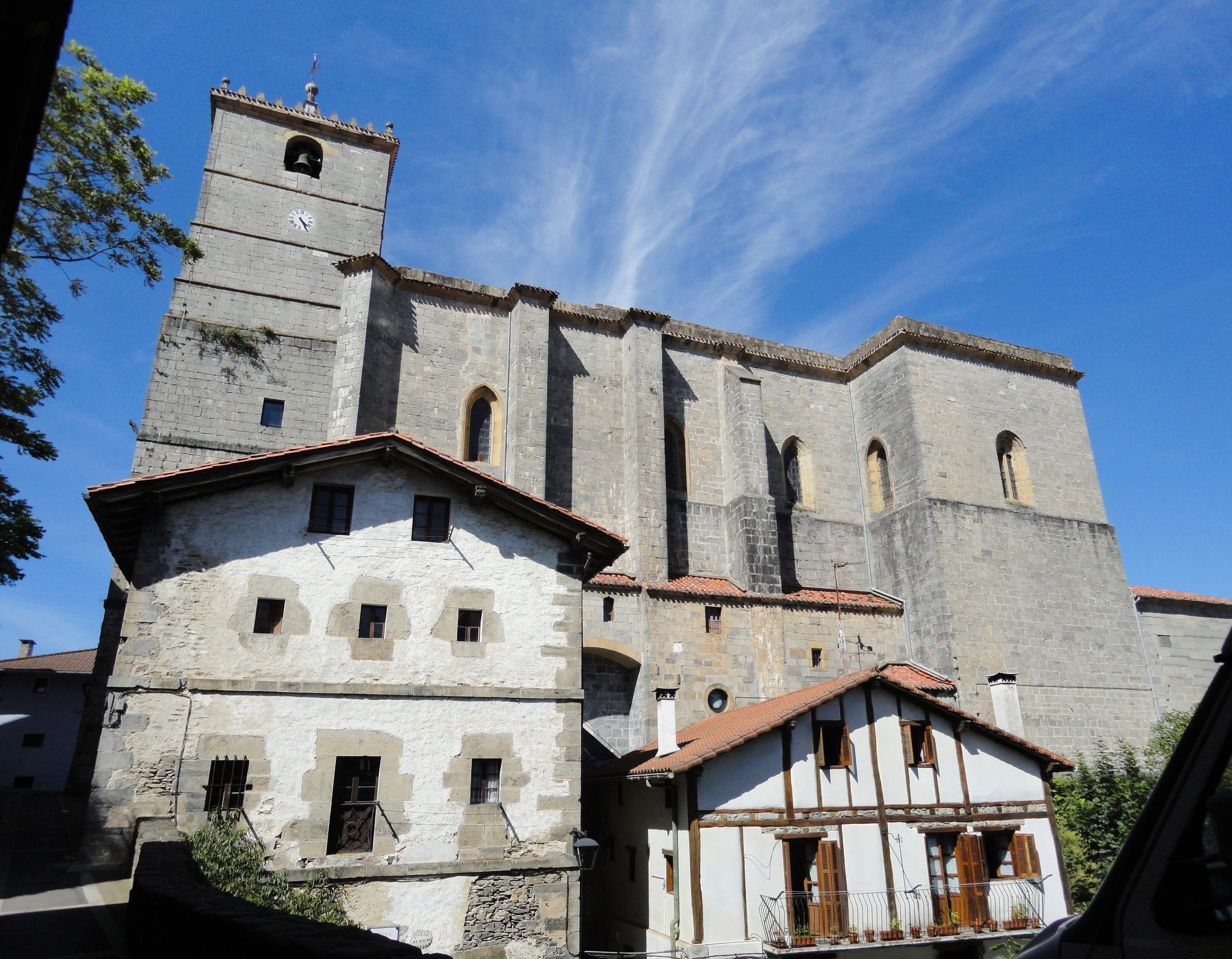 San Esteban eliza - Aia